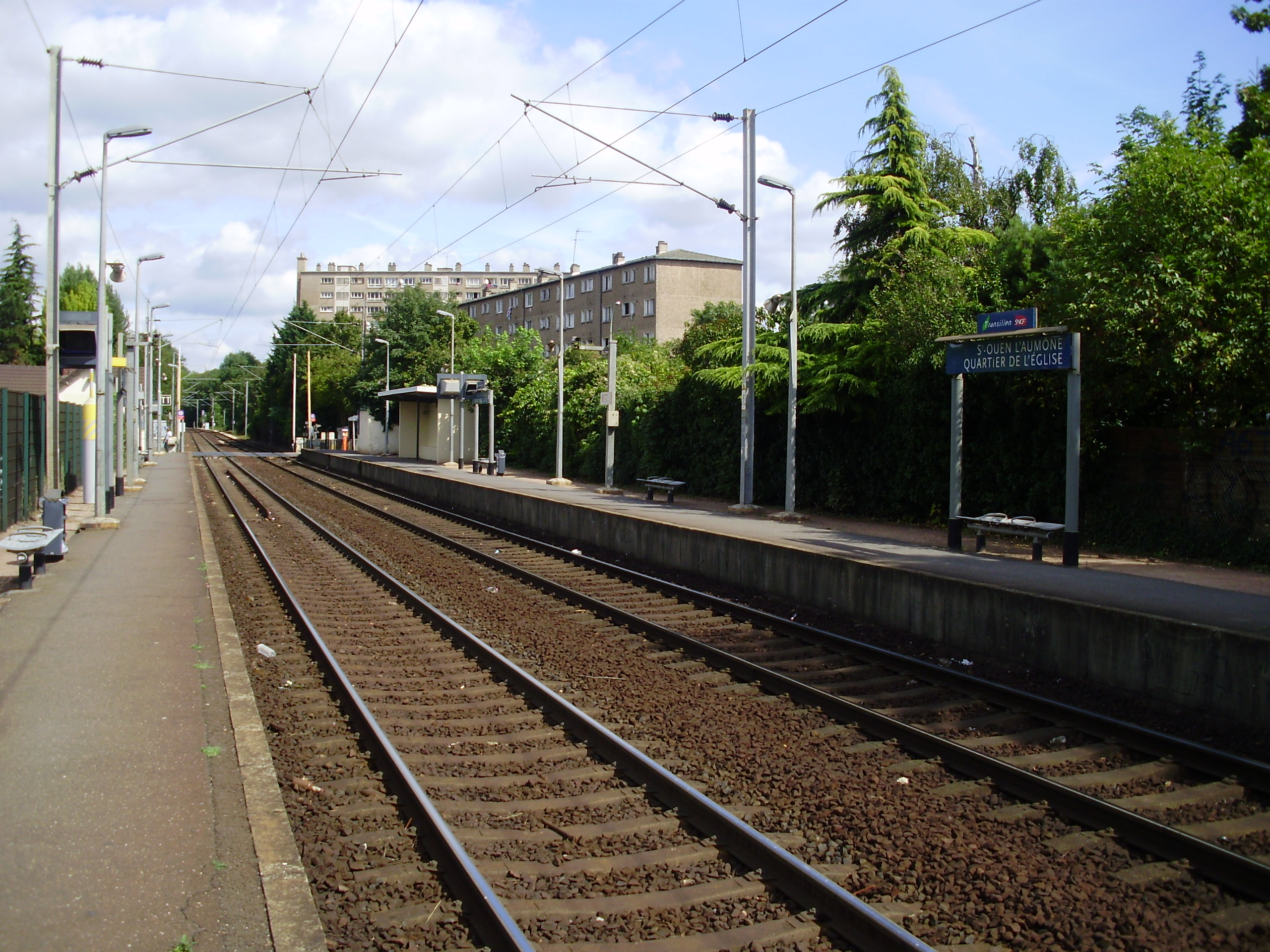 Gare de Saint-Ouen-l'Aumône-Quartier de l'Église, à Saint-Ouen-l'Aumône, Val-d'Oise, France : quais et voies depuis le milieu du quai pour Pontoise